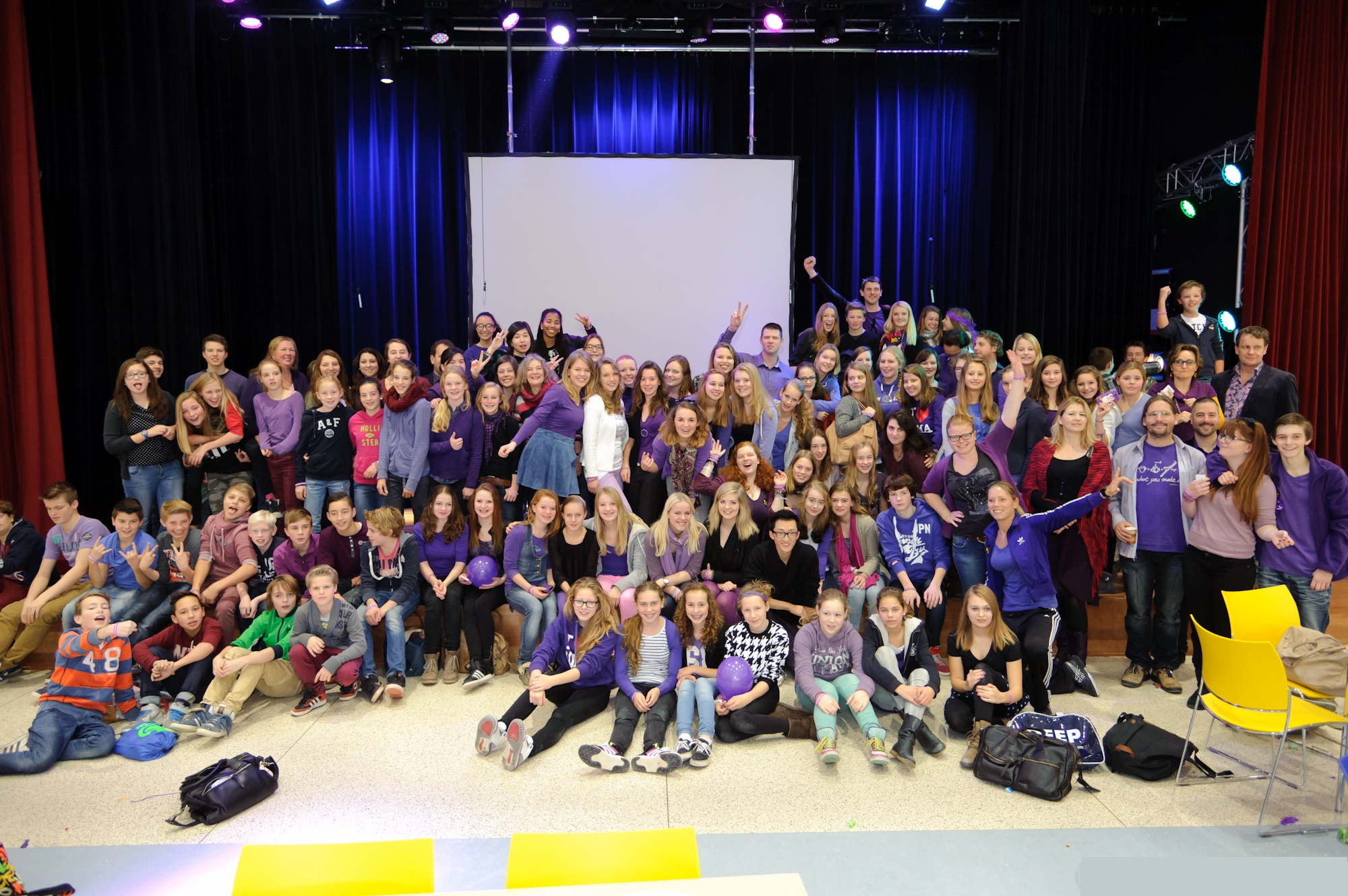 Paarse Vrijdag op het Baarns Lyceum in Baarn.